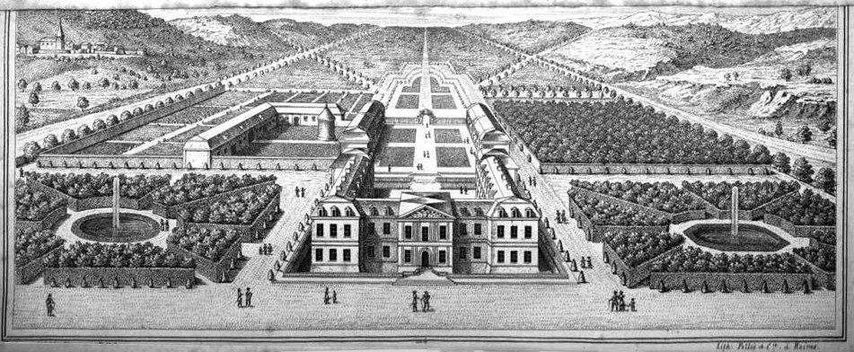 perspective du parc et du château de Louvois.